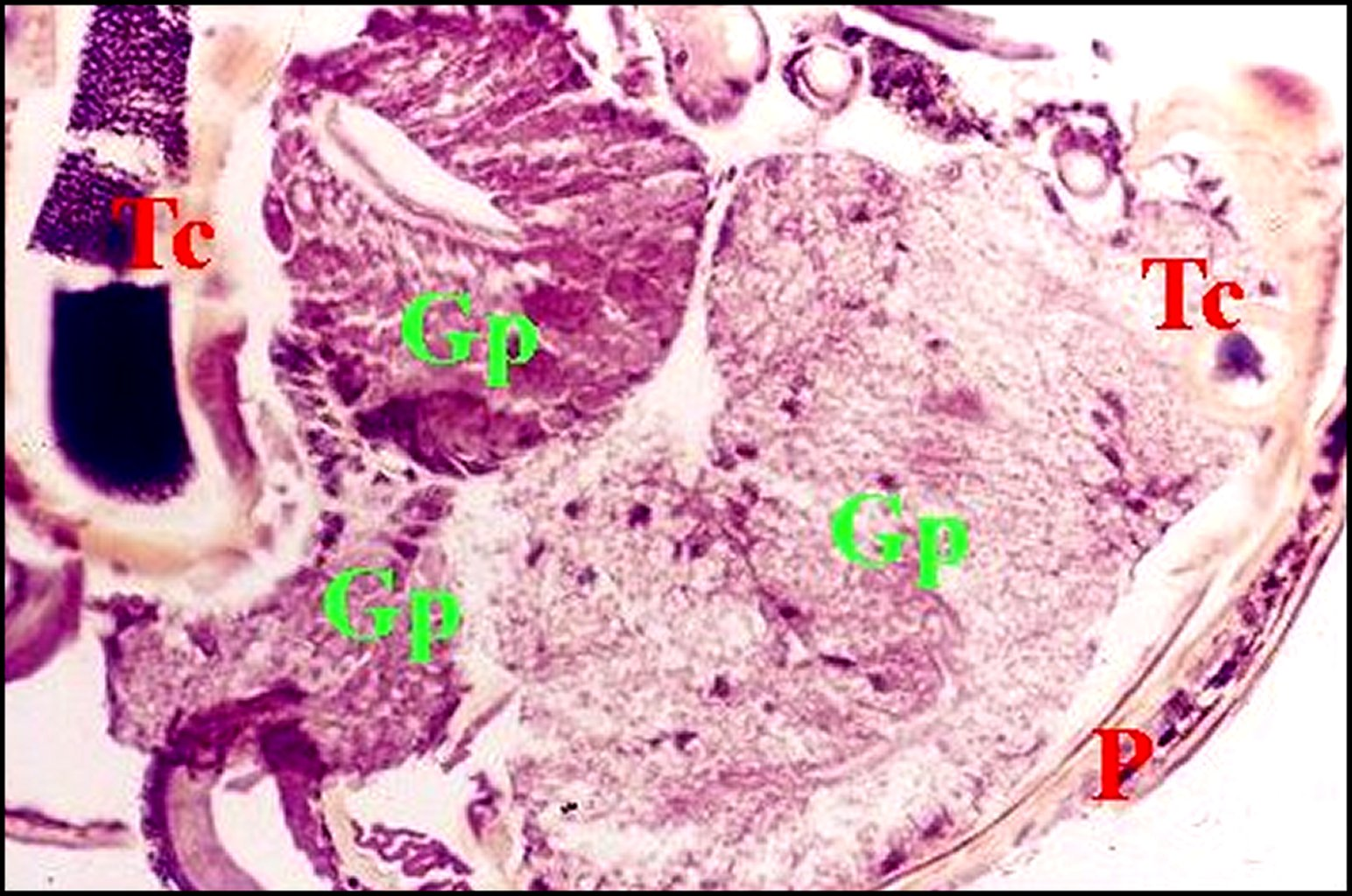 Coupe histologique de bulbe copulateur d' Argyrodes mâle montrant la glande très développée de son tube séminifère